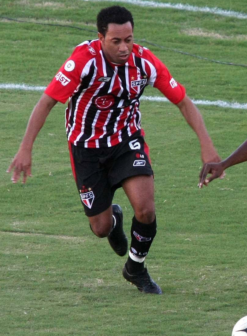 O jogador de futebol Junior, Jenilson Ângelo de Souza, que em 2008 jogava pelo São Paulo FC e já jogou na Seleção Brasileira.